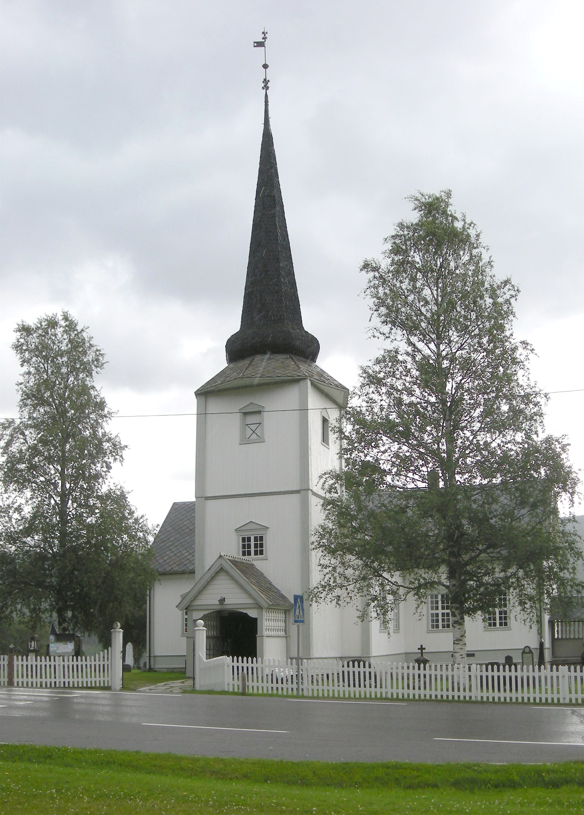 Øvre Rendal kirke på Bergset med fylkesvei 30 foran